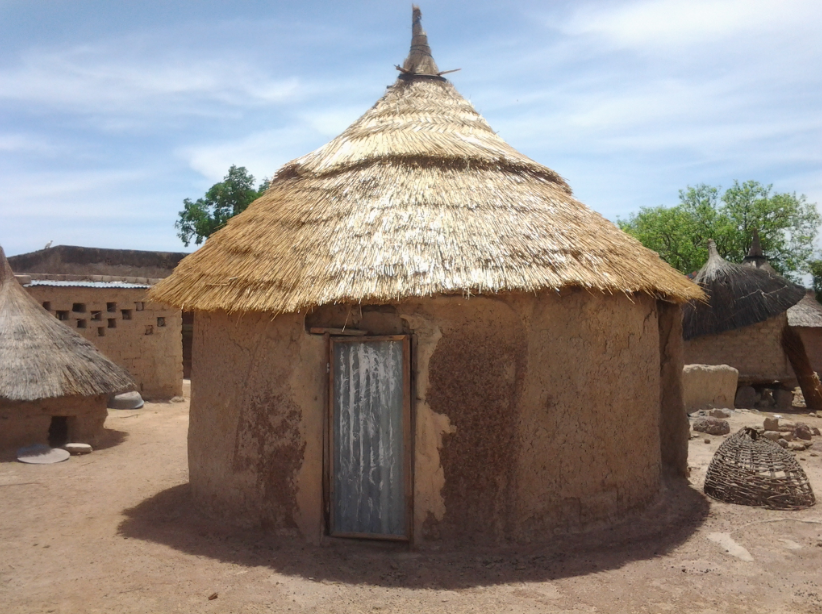 Le premier type d’habitation à Péyiri est construit en paille ou en brique de terre, ronde avec une porte et un toit en chôme